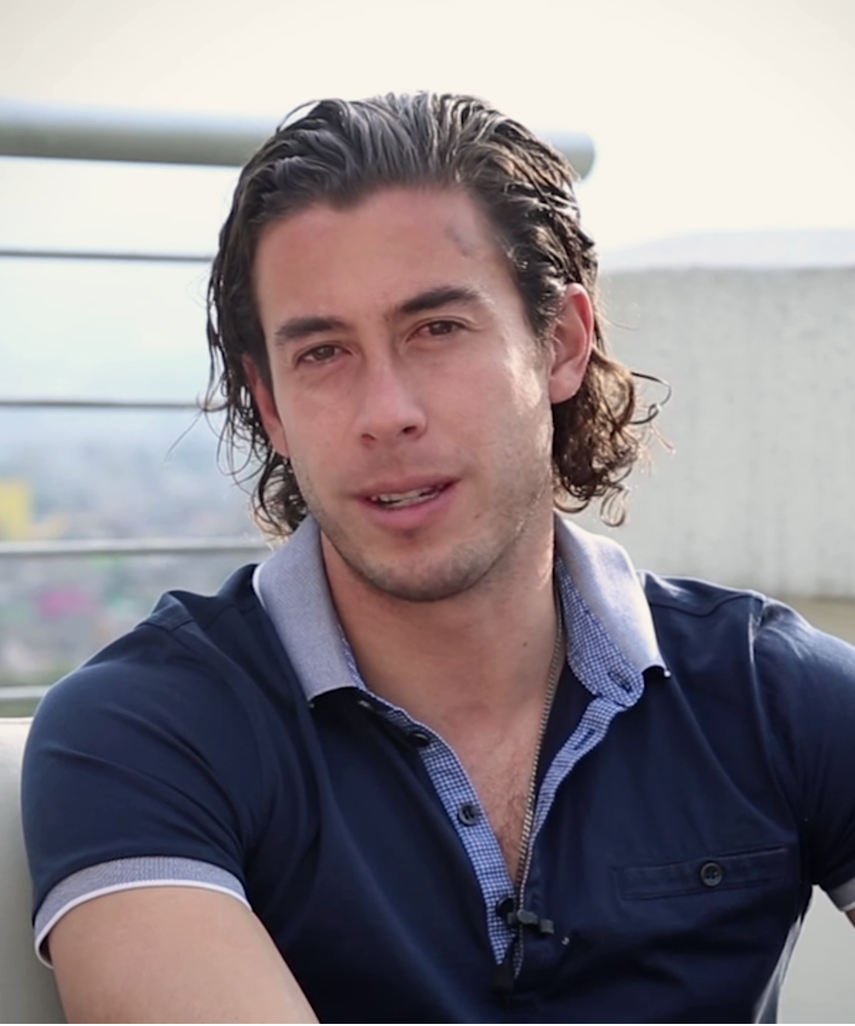 Óscar Jiménez en 2017.